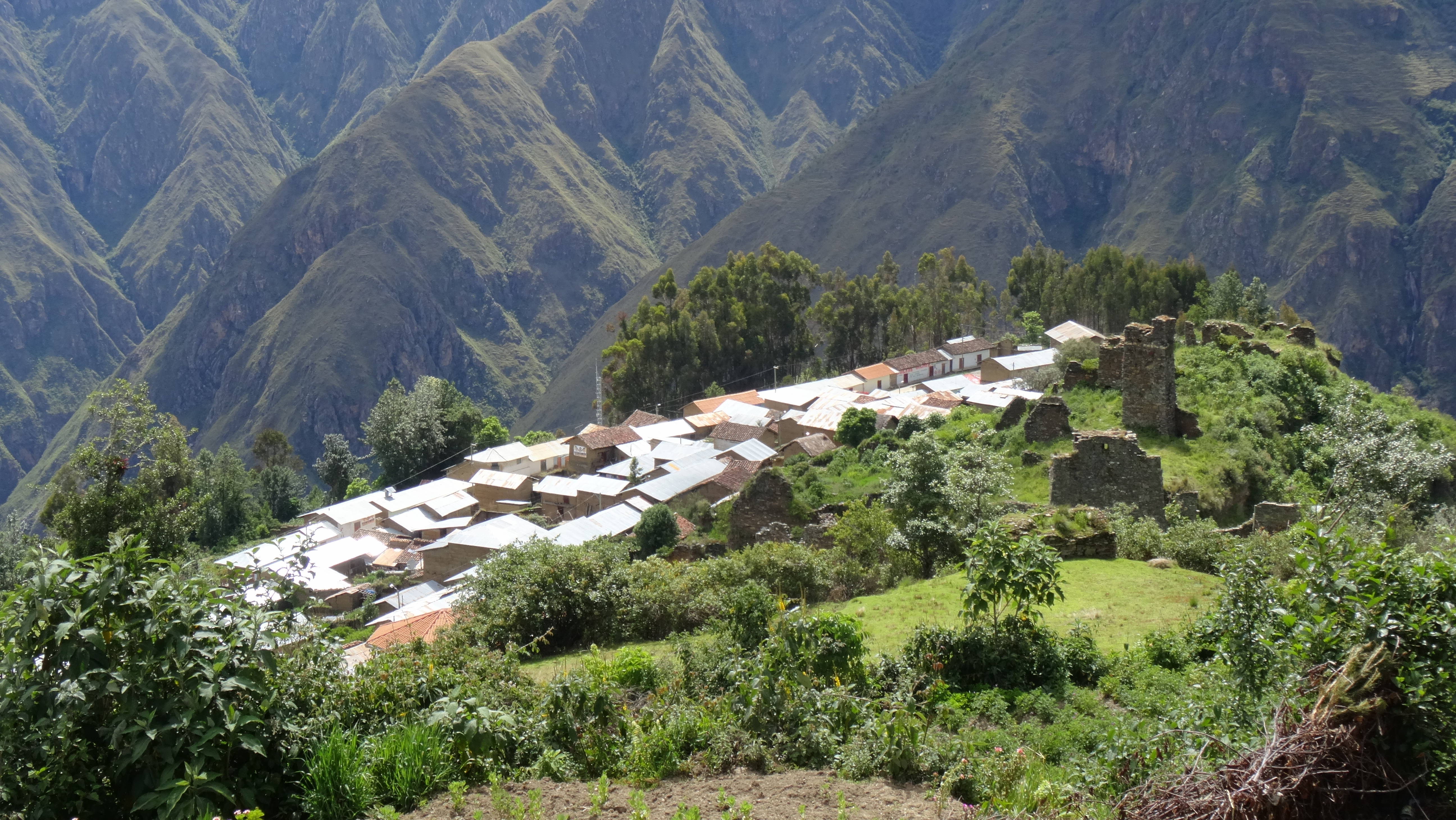 Vista del poblado de Urpish desde las ruinas de Cruzpampa.